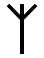 runic letter algiz